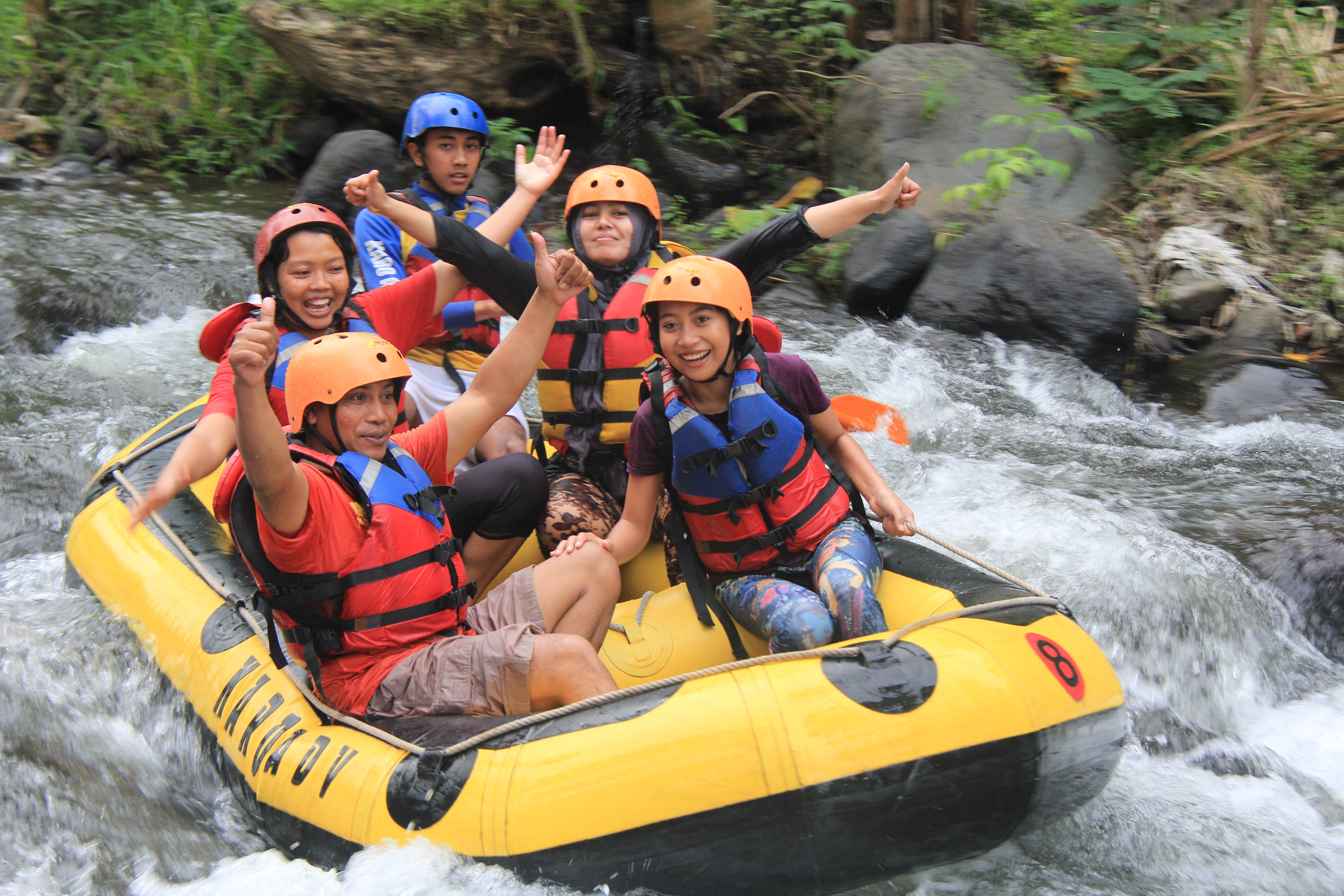 Arung Jeram Karo Adventure Banyuwangi berlokasi di Sungai Bate (Kali Badeng) di Desa Sumber Bulu Kecamatan Songgon